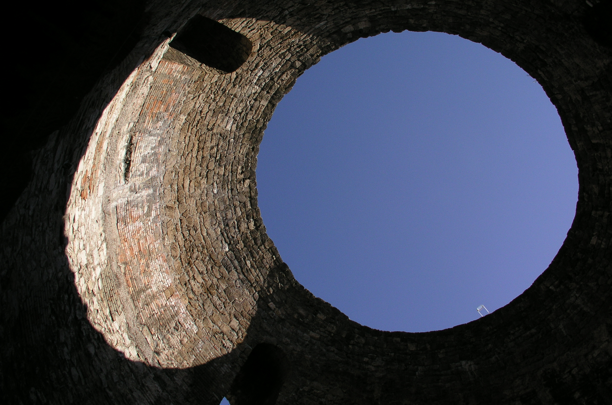 Split, Vestibul, Croatia